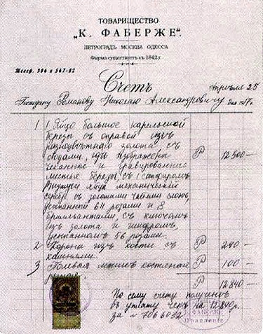 Рахунок Фірми Фаберже від 25 квітня 1917 року - Рахунок був виставлений імператору Миколі II за виготовлення великоднього яйця "Березове"